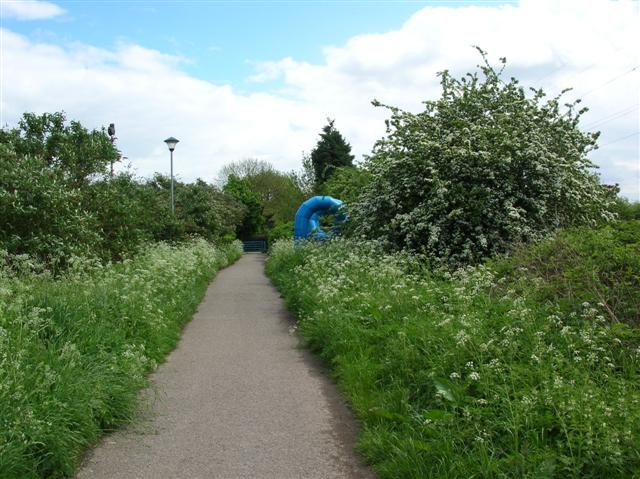 Sustrans Route 66 - Osbaldwick